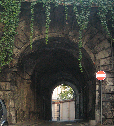 autore f.noceti